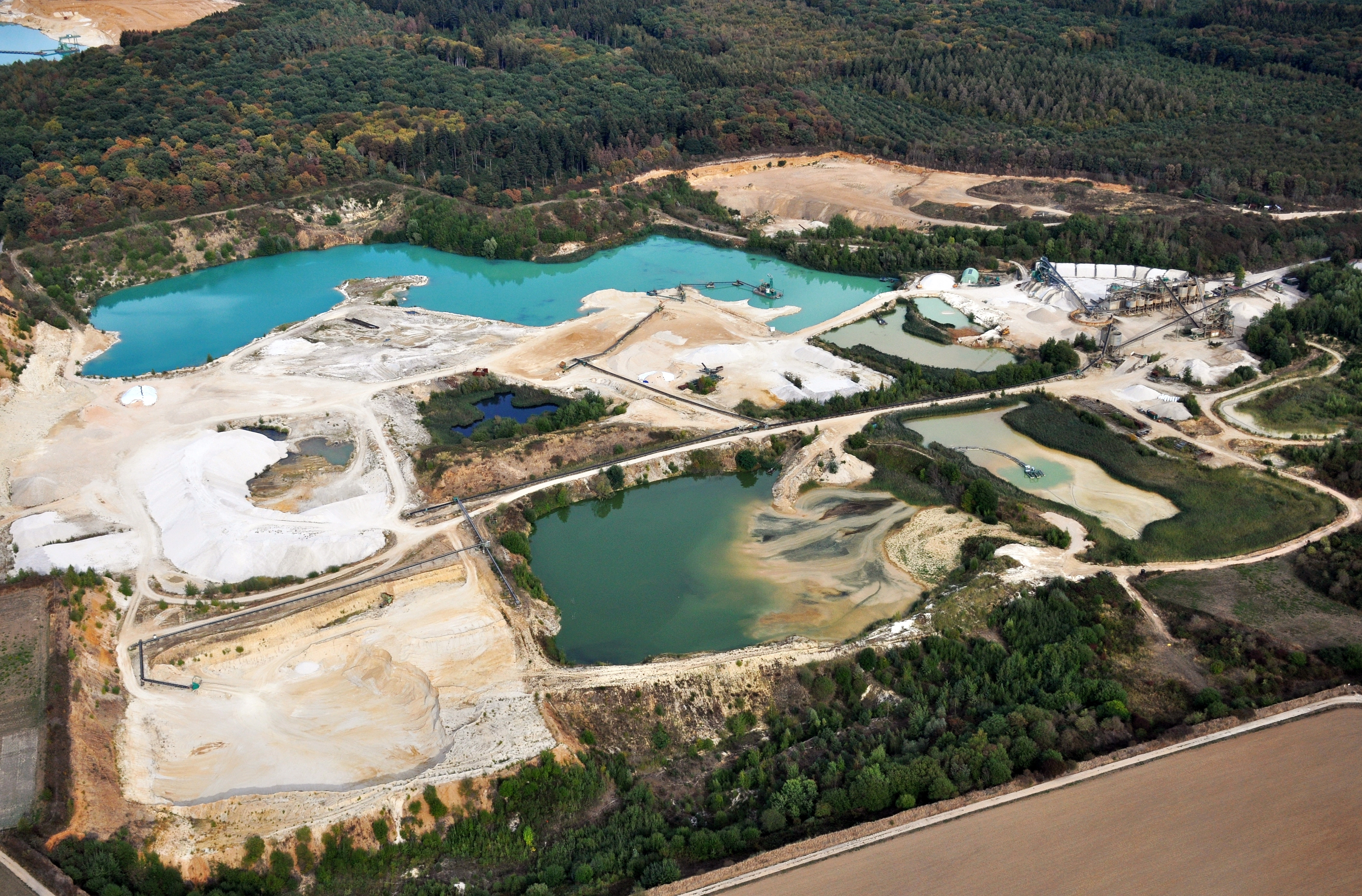 Naturschutzgebiet Kiesgrube Flerzheim am Kottenforstrand nördlich Flerzheim und südöstlich Buschhoven